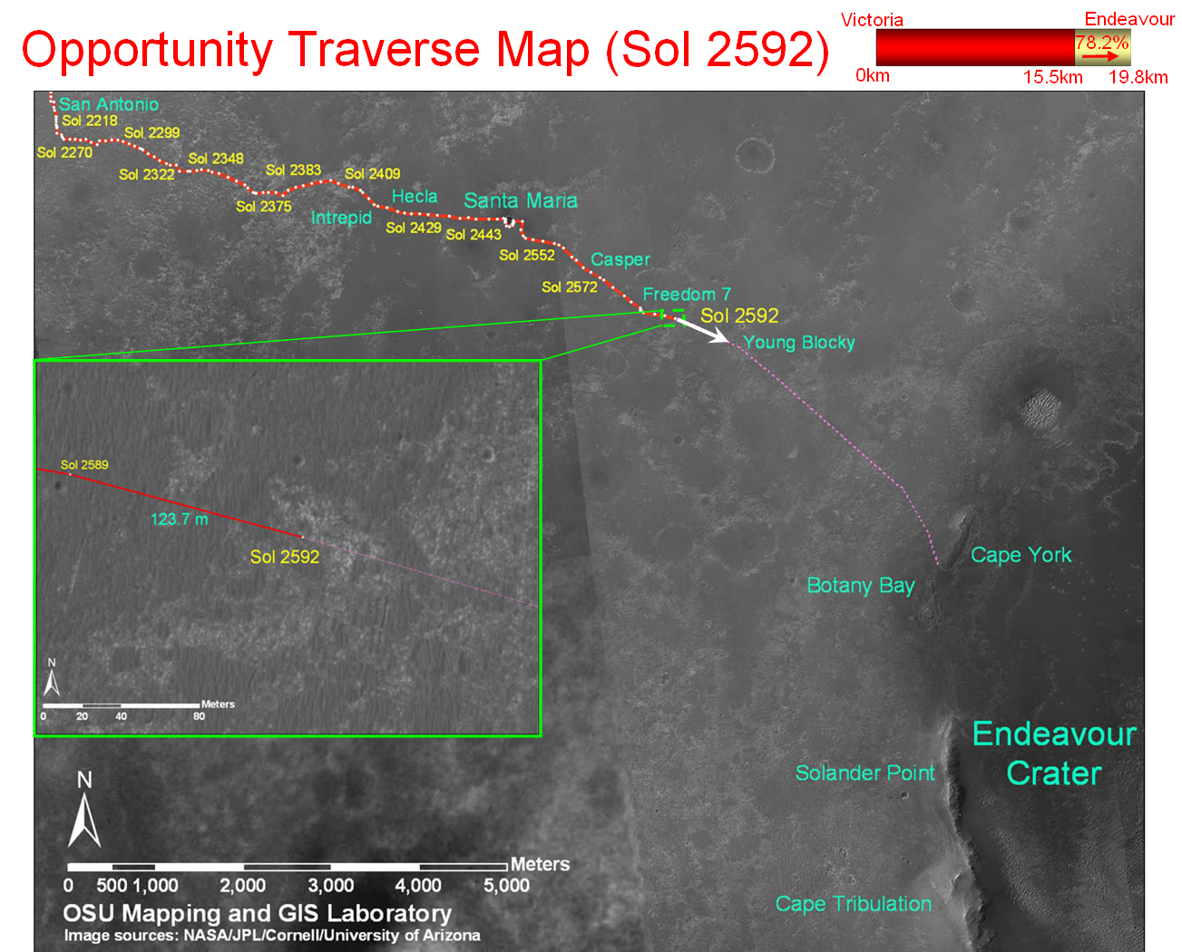 Route von Opportunity bis Sol 2218 bis Sol 2592